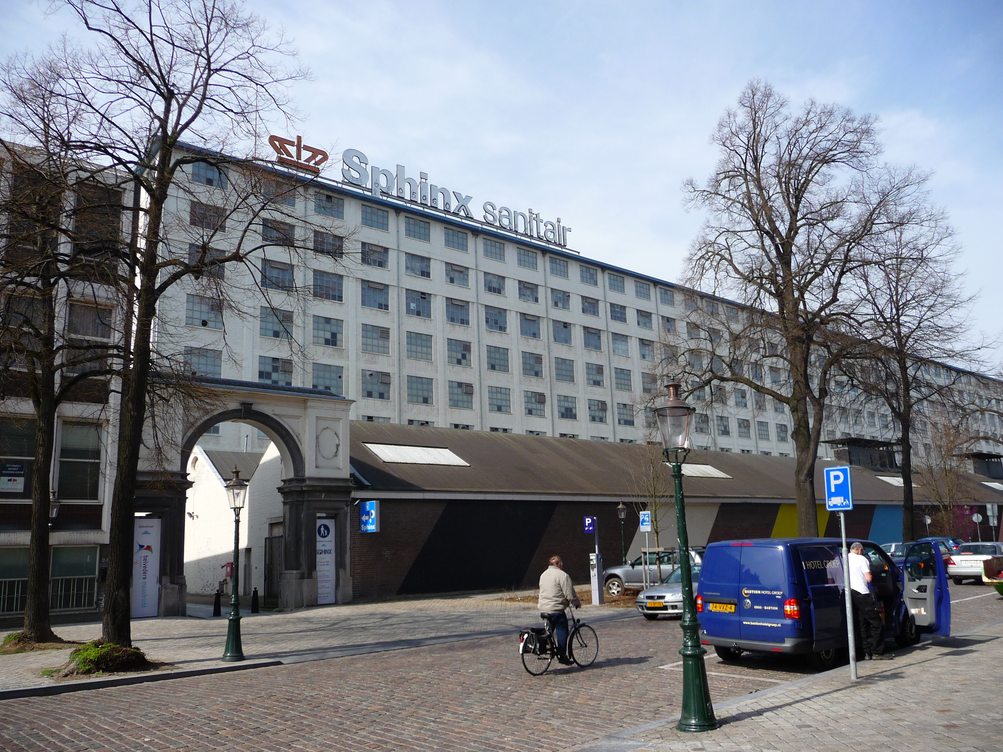 Rijksmonument in Maastricht. Boschstraat.